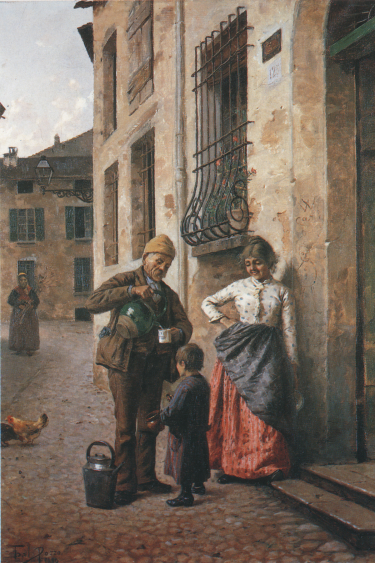 Tomaso Dal Pozzo, Il lattaio, 1902 circa, olio su tela, 66,5x46,5 cm., Pinacoteca Comunale di Faenza, inv. n. 707, Foto realizzate a cura dell’Istituto per i Beni Artistici Culturali e Naturali della Regione Emilia-Romagna nell’ambito delle attività di catalogazione finanziate dalla Legge Regionale 18/2000.